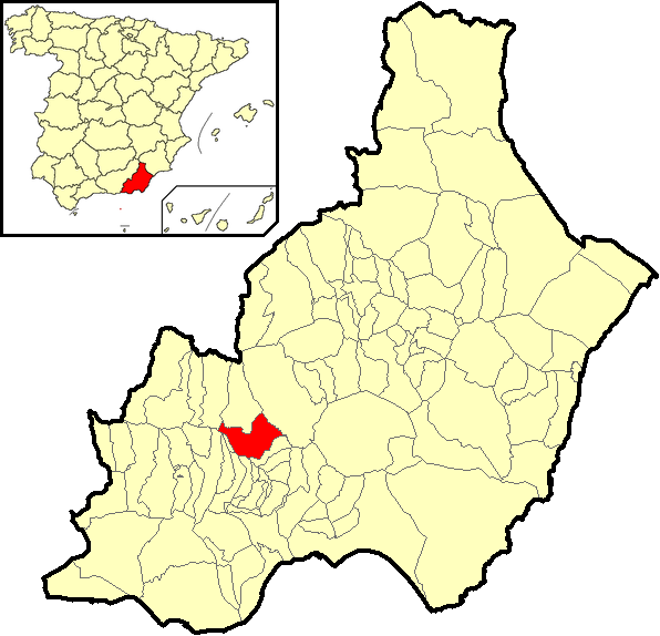 Situación del término municipal de Alboloduy respecto a la provincia de Almería, en España.